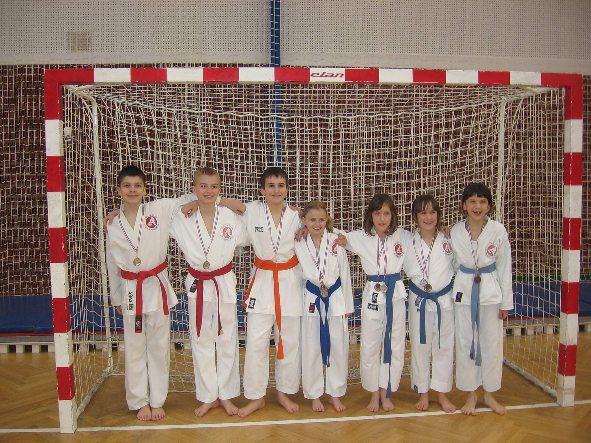 Karate-klub "Beli Manastir 98", Beli Manastir